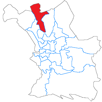 Situation du canton dans la ville de Marseille